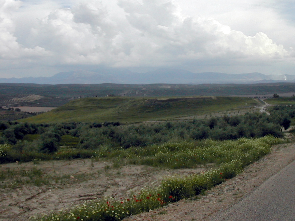 Restos de la ciudad ibero-romana de Cástulo en Jaén.